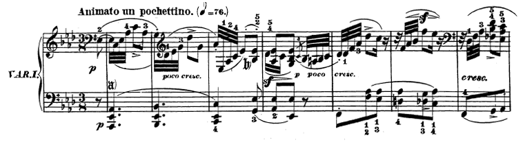 Compassos iniciais do primeiro movimento da Sonata Op. 26 de Beethoven - Variação I